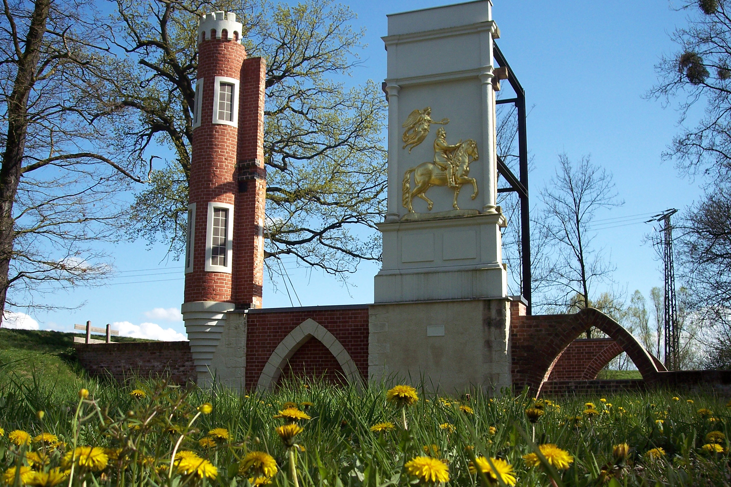 Schwedenhaus am Schwedenwall in Dessau-Waldersee